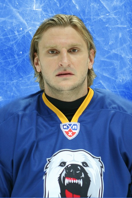 Хоккеист Олег Кваша